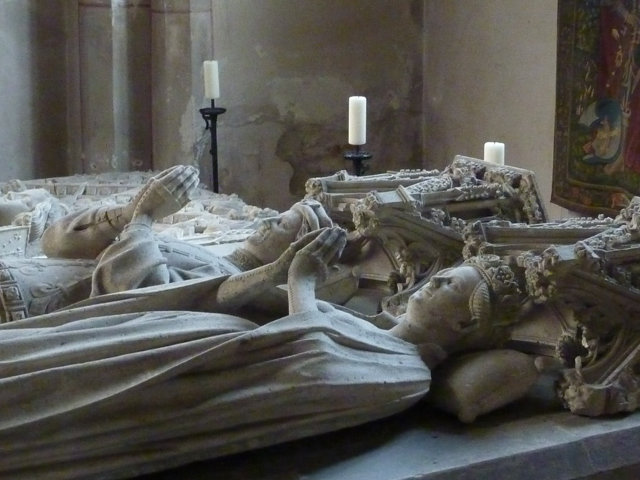 Stiftskirche (Kleve) - Grabmal des Grafen Adolf III. von der Mark (gestorben 1394) und seiner Frau Margarete von Jülich (gestorben 1425)